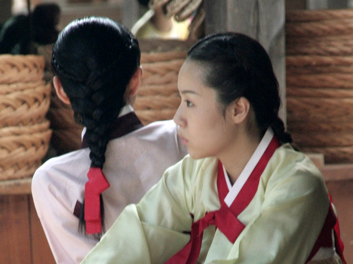 Daenggi (a hair ribbon) on the braided hair.